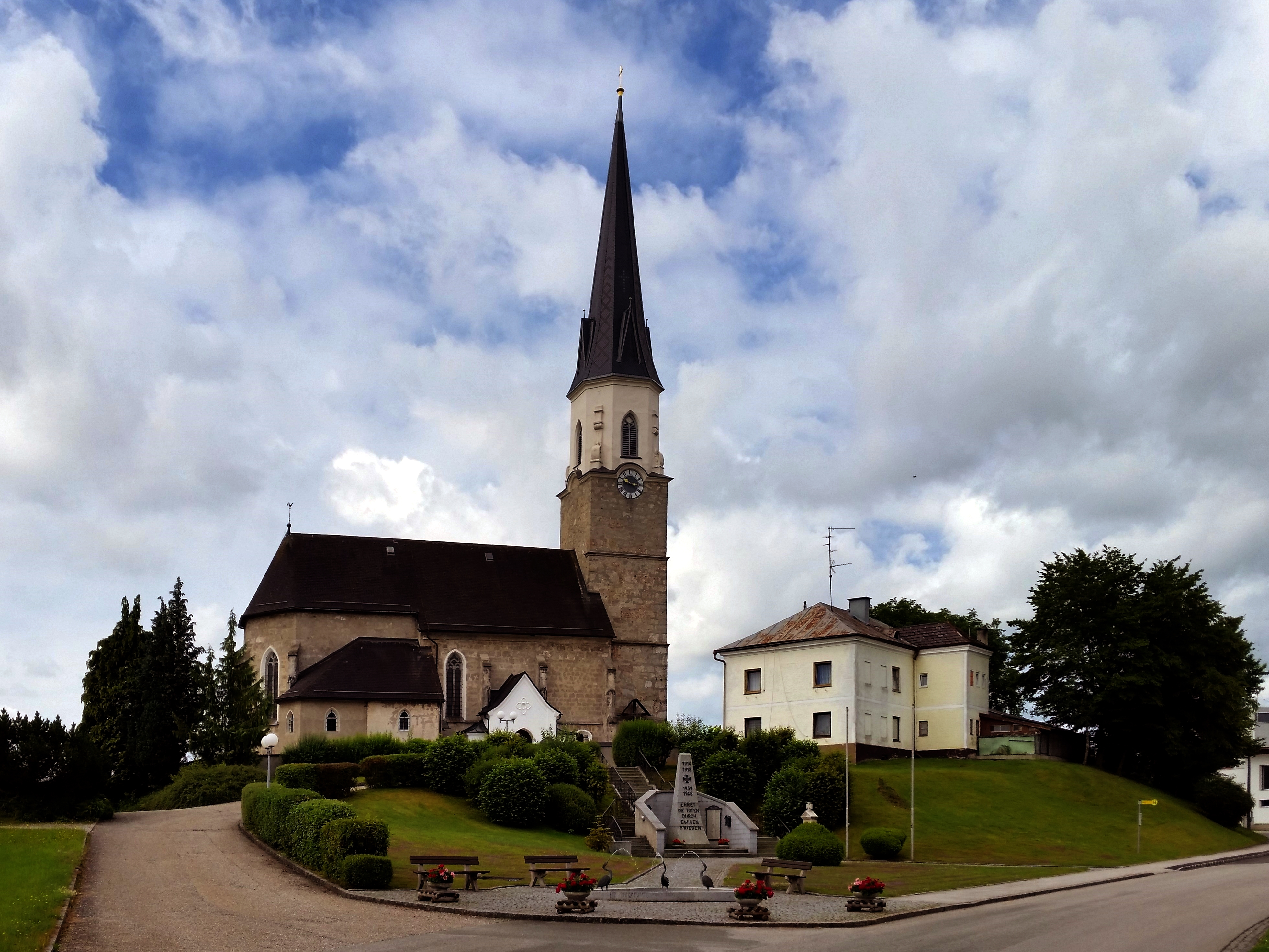 Kath. Pfarrkirche hll. Peter und Paul sowie Friedhof